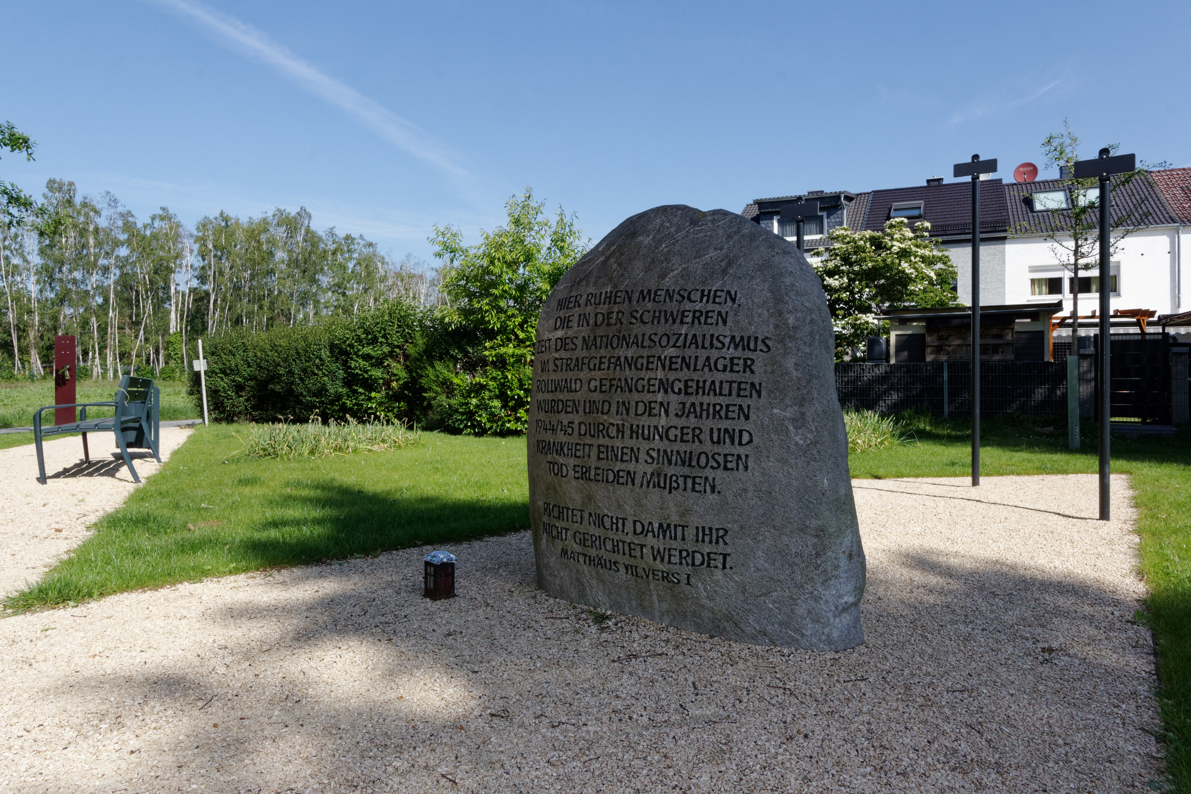 Gedenkstätte auf dem ehemaligen Friedhof des NS-Strafgefangenenlagers Rollwald, 2018 nach einem Entwurf von Dirk Melzer umgestaltet.